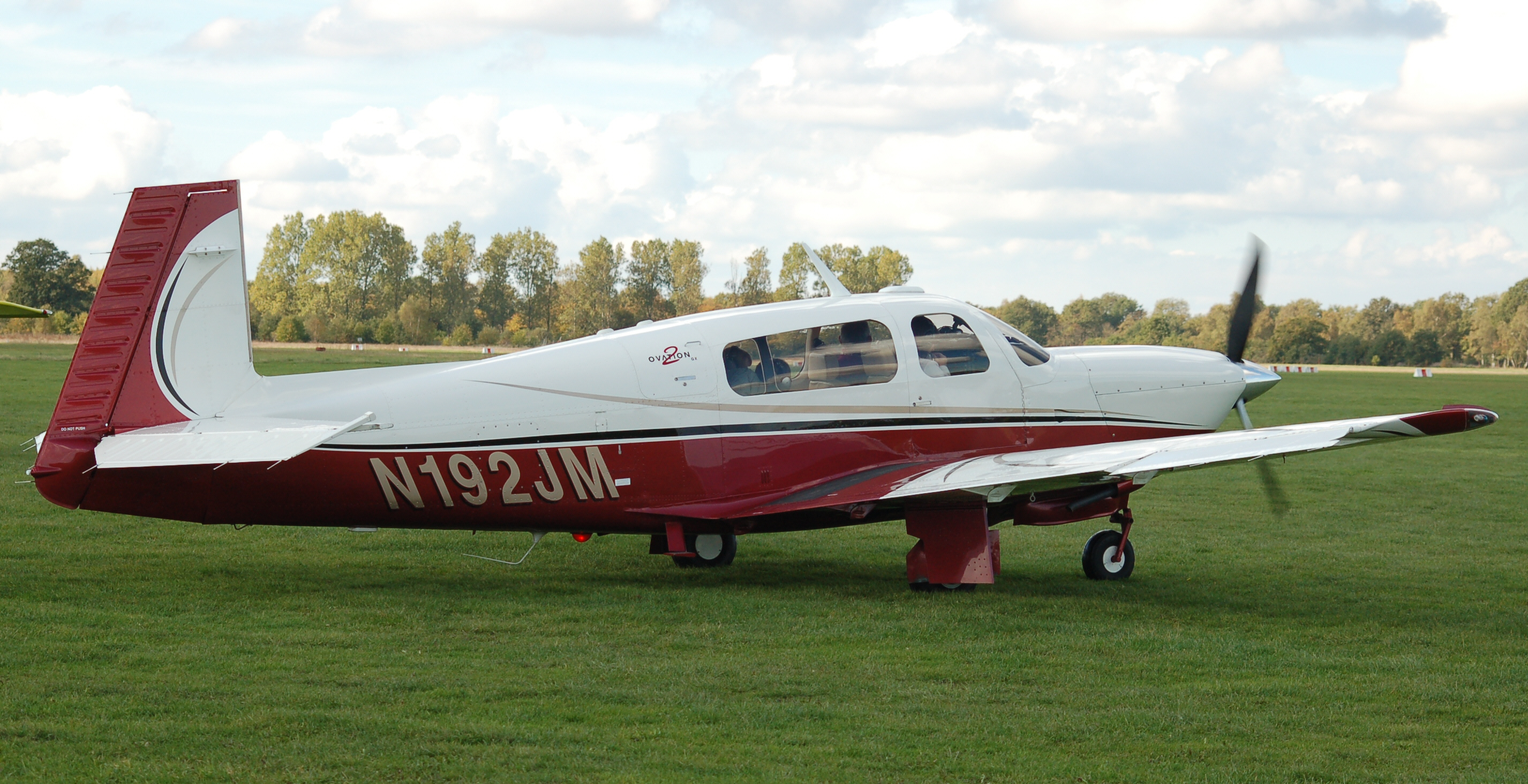 Mooney M20R Ovation 2 (N192JM) auf dem Flugplatz Uetersen